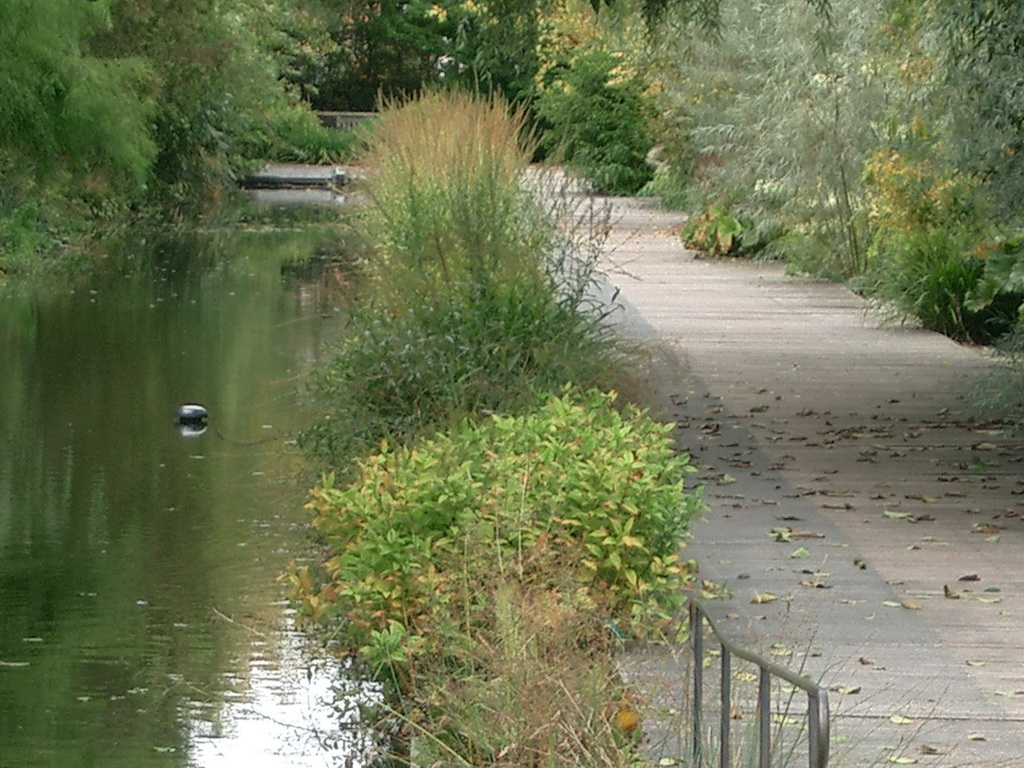 Valloires, le Riverel reconstitué